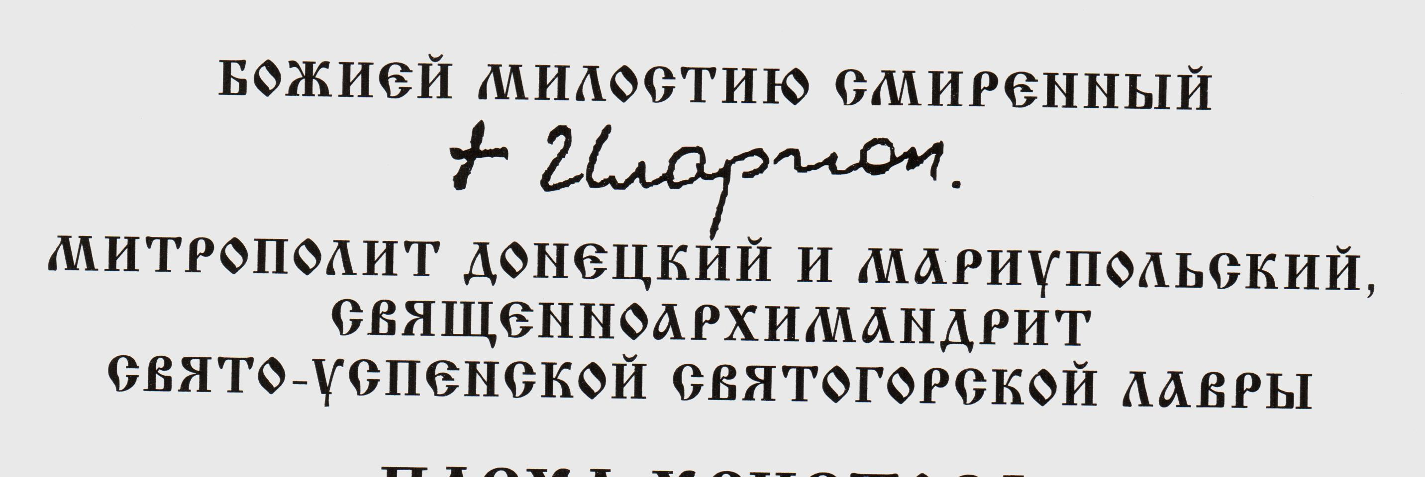 Подпись и должность митрополита Донецкого Илариона (Шукало) под посланием. 2011 год.